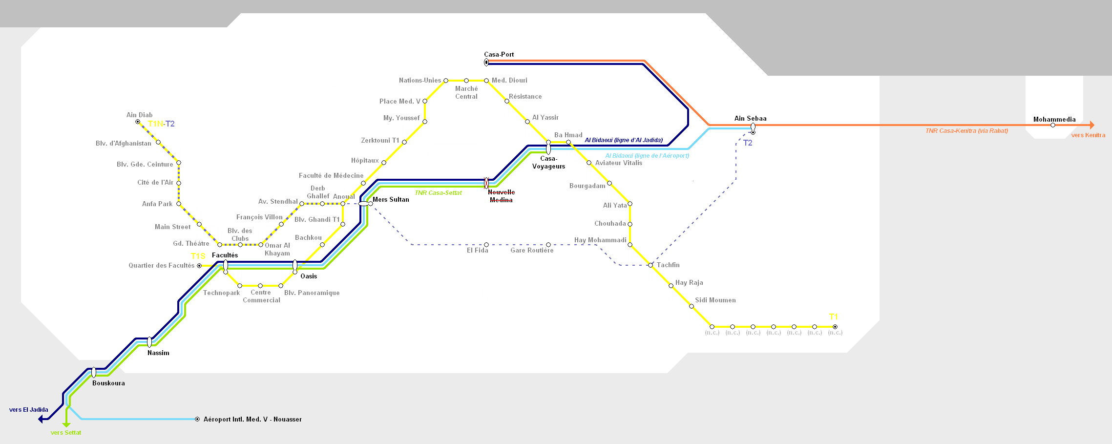 Schéma du réseau ferroviaire de la région du Grand Casablanca et des lignes de tramway 1 et 2 (horizon 2013)